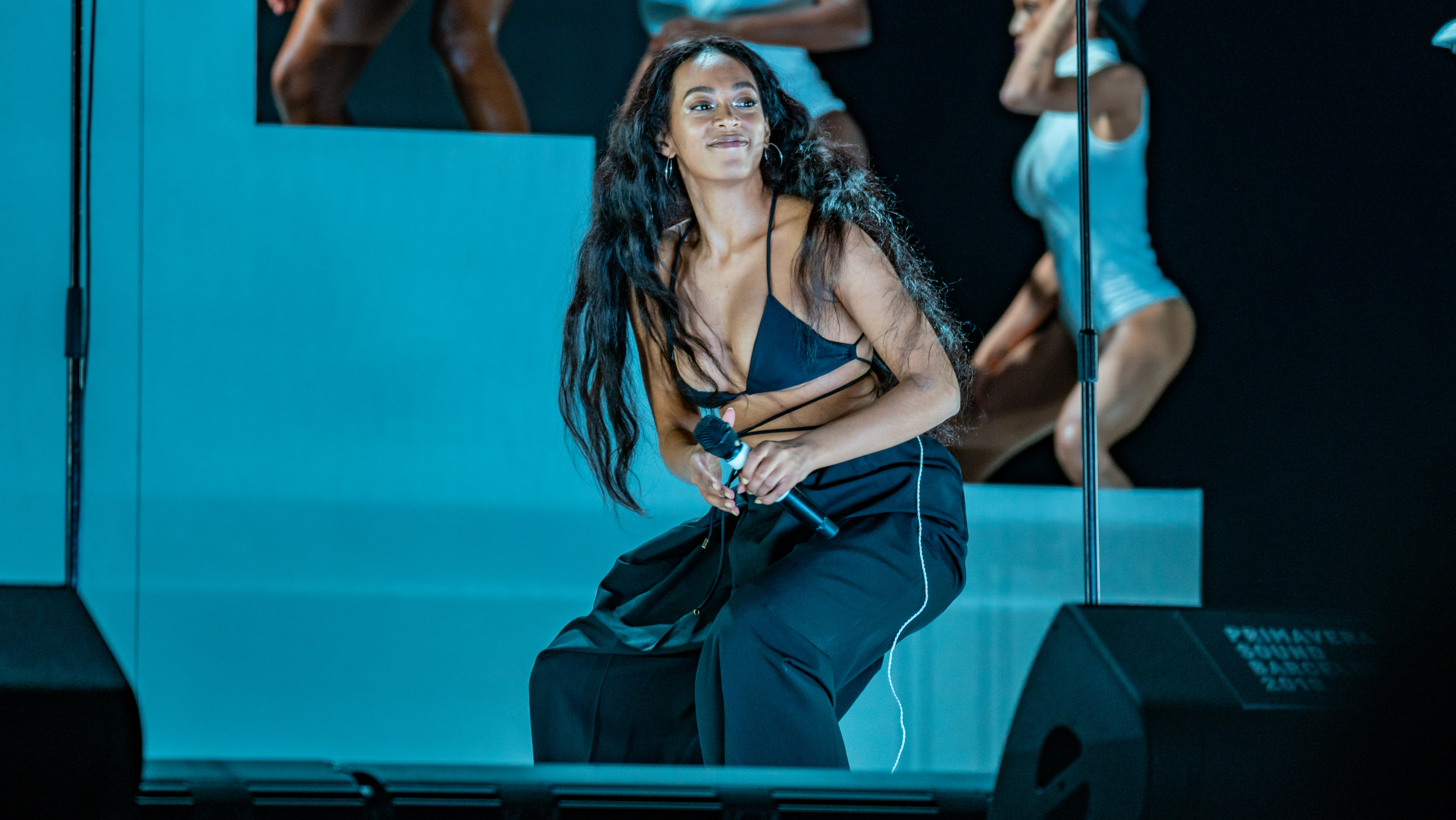 Primavera19_-305